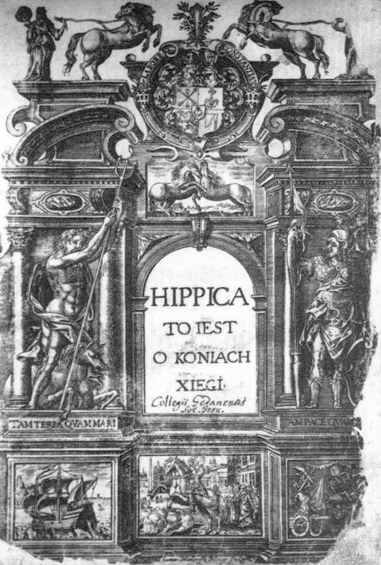 Беларуская (тарашкевіца): Крыштап Дарагастайскі «Гіпіка, альбо Кніга пра коней»